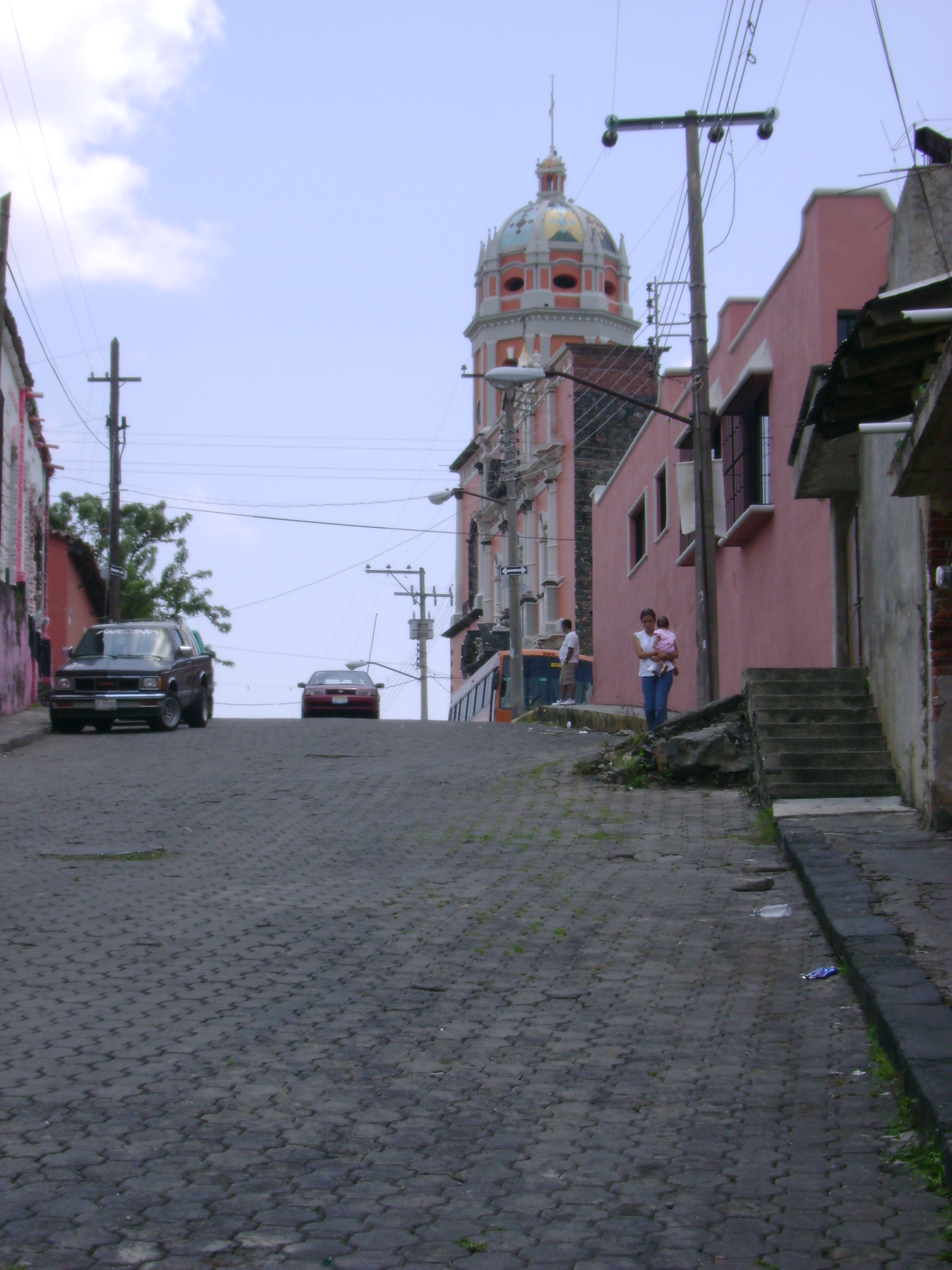 Iglesia de Tonila, símbolo del municipio visto desde una calle.